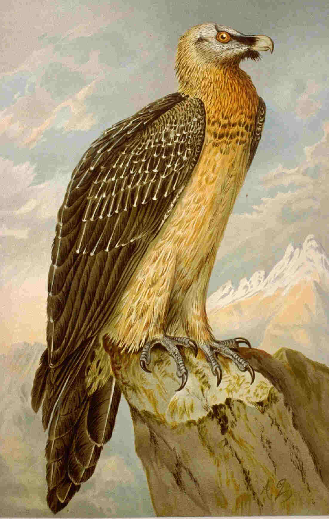 Gypaetus barbatus